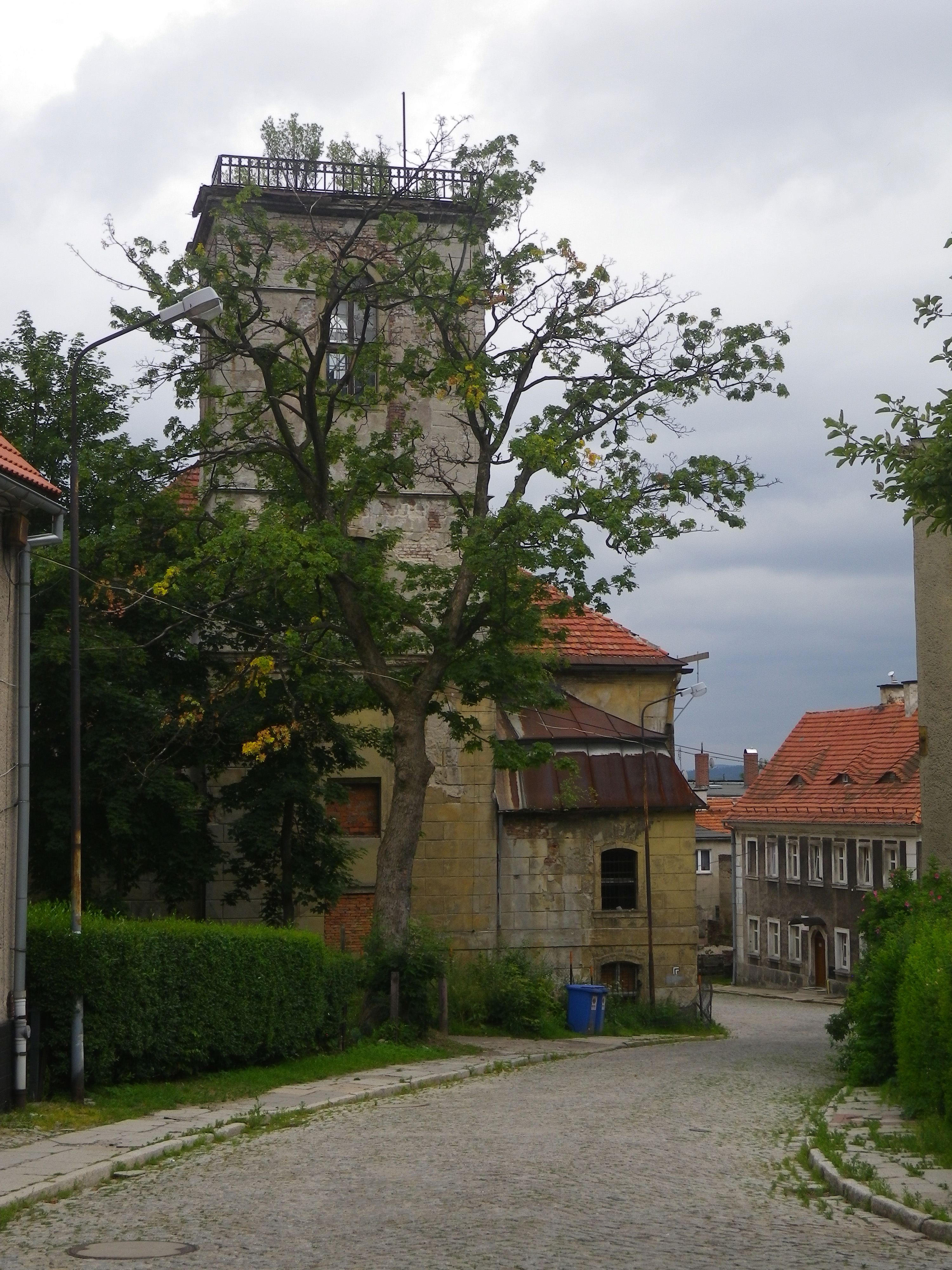 Boguszów-Gorce, ul. Kasprzaka 13 - dawny kościół ewangelicki, obecnie ruina, poł. XVIII